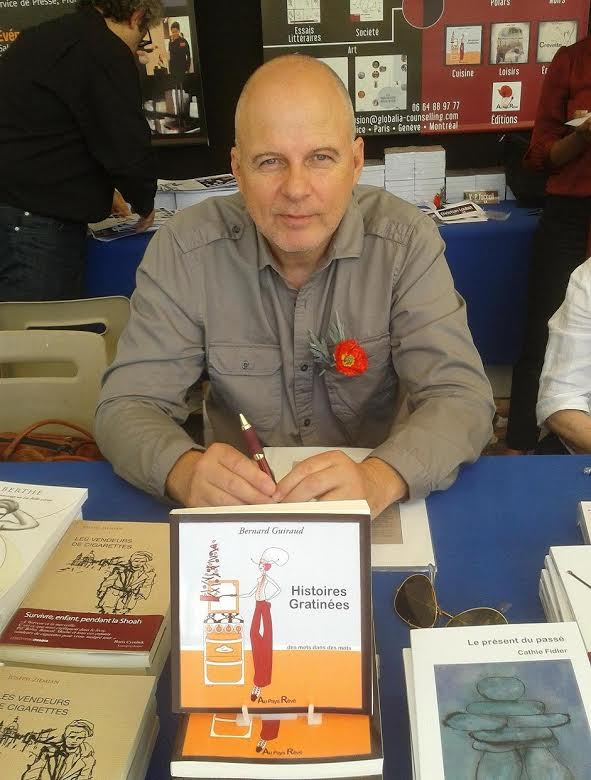 Bernard Guiraud au Salon du Livre 2012